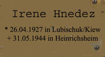 Die Gedenktafel für die russische Kriegsgefangene